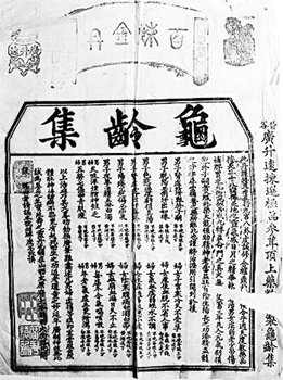 龟龄集药方